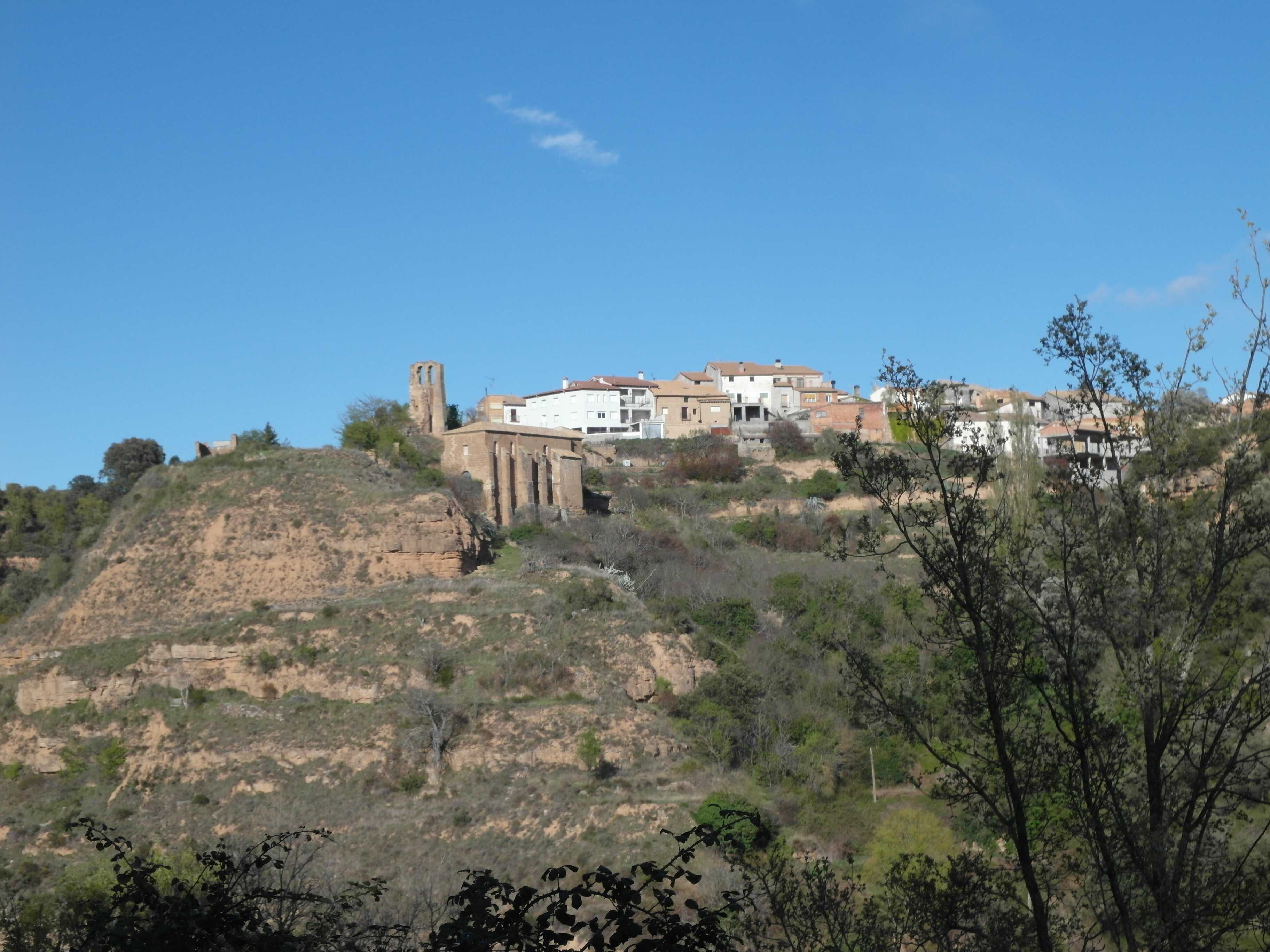 Alberuela de la Liena, Huesca.